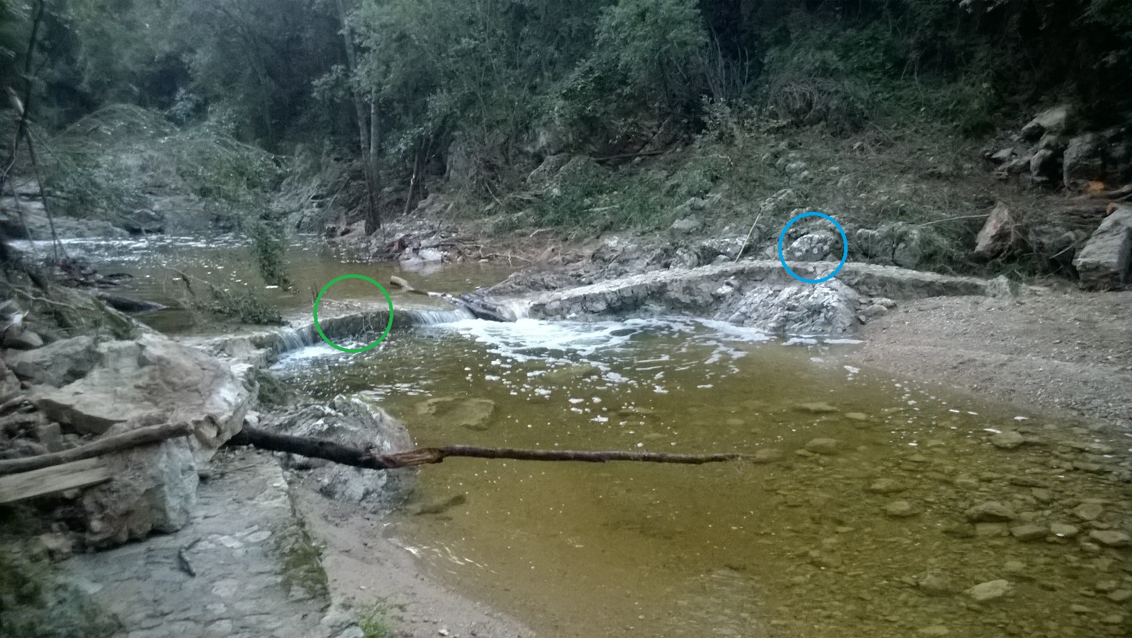 Octobre 2015, après les innondations. Les cercles vert et bleu se retrouvent sur la même photo prise en Juillet 2014.